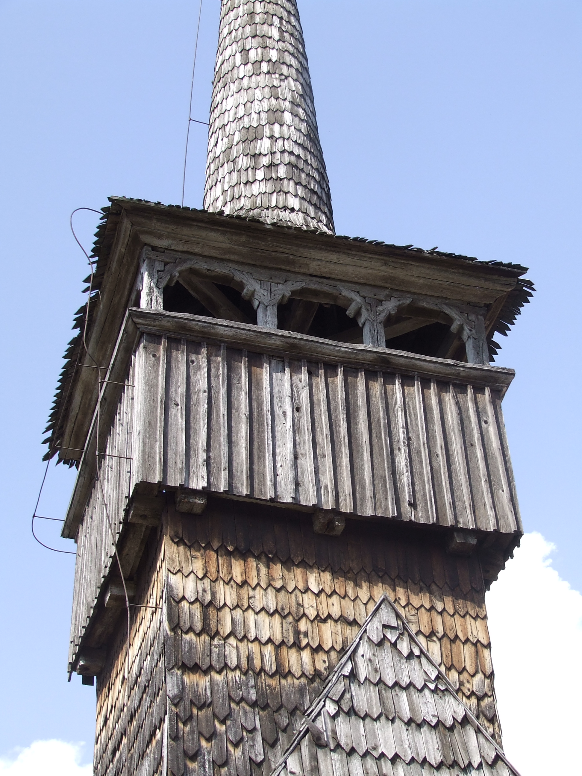 Galeria turnului, Biserica de lemn Sf Arhangheli din Letca, jud. Sălaj